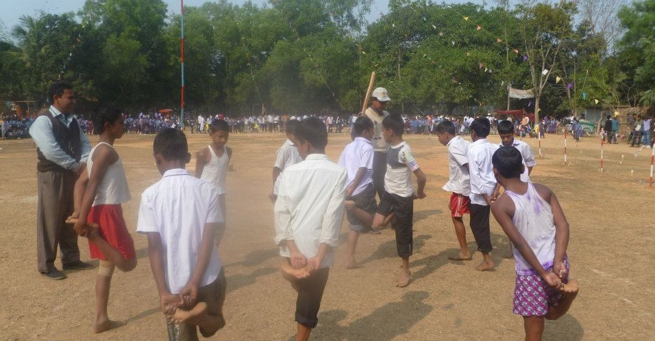 মোরগ লড়াই খেলার স্থিরচিত্র।